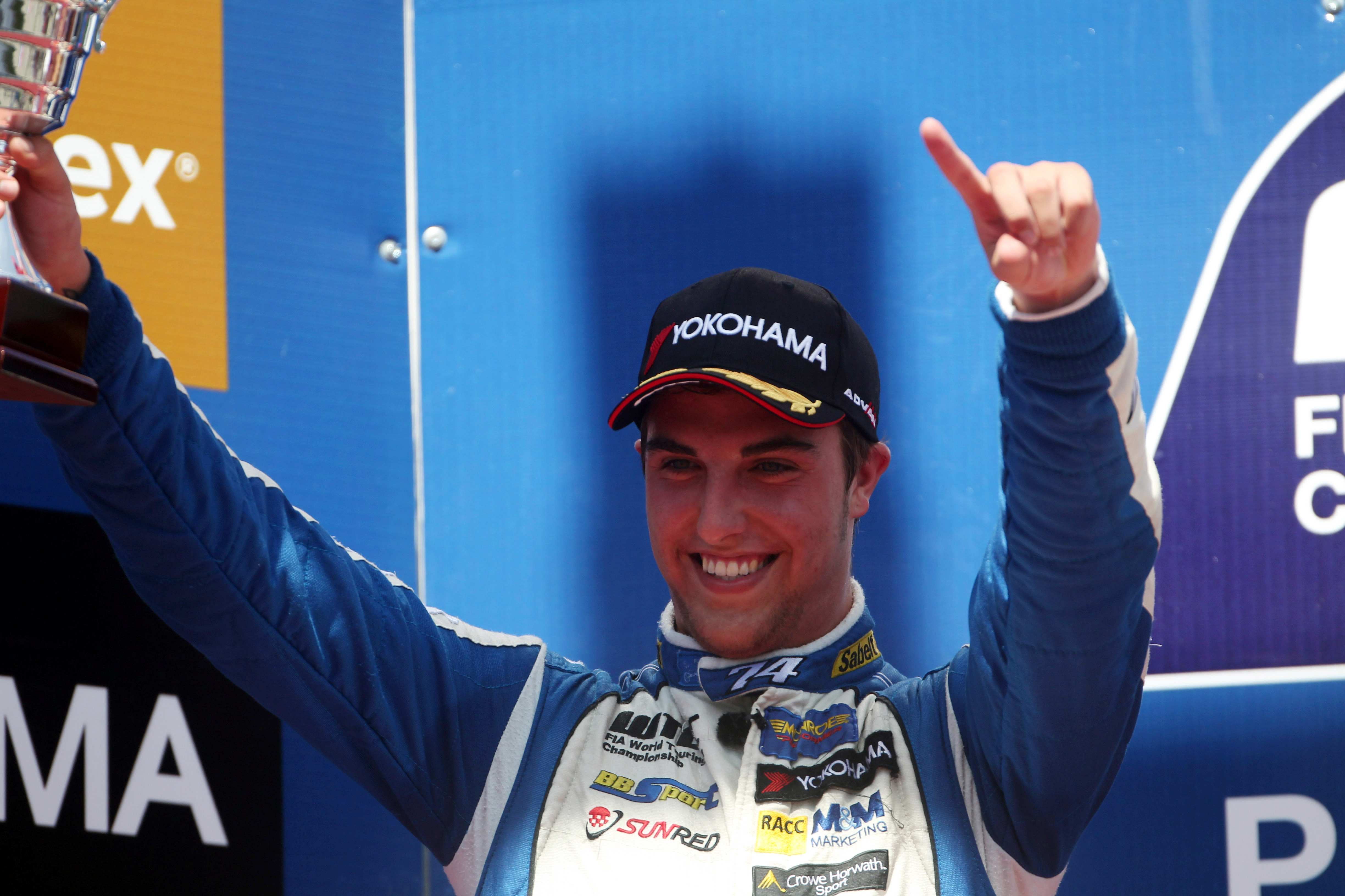 Portugal 2012 WTCC